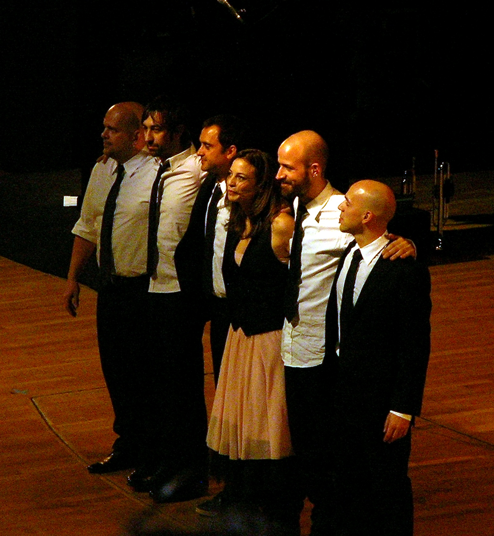 Concierto de Marlango en el Auditorio Víctor Villegas de Murcia